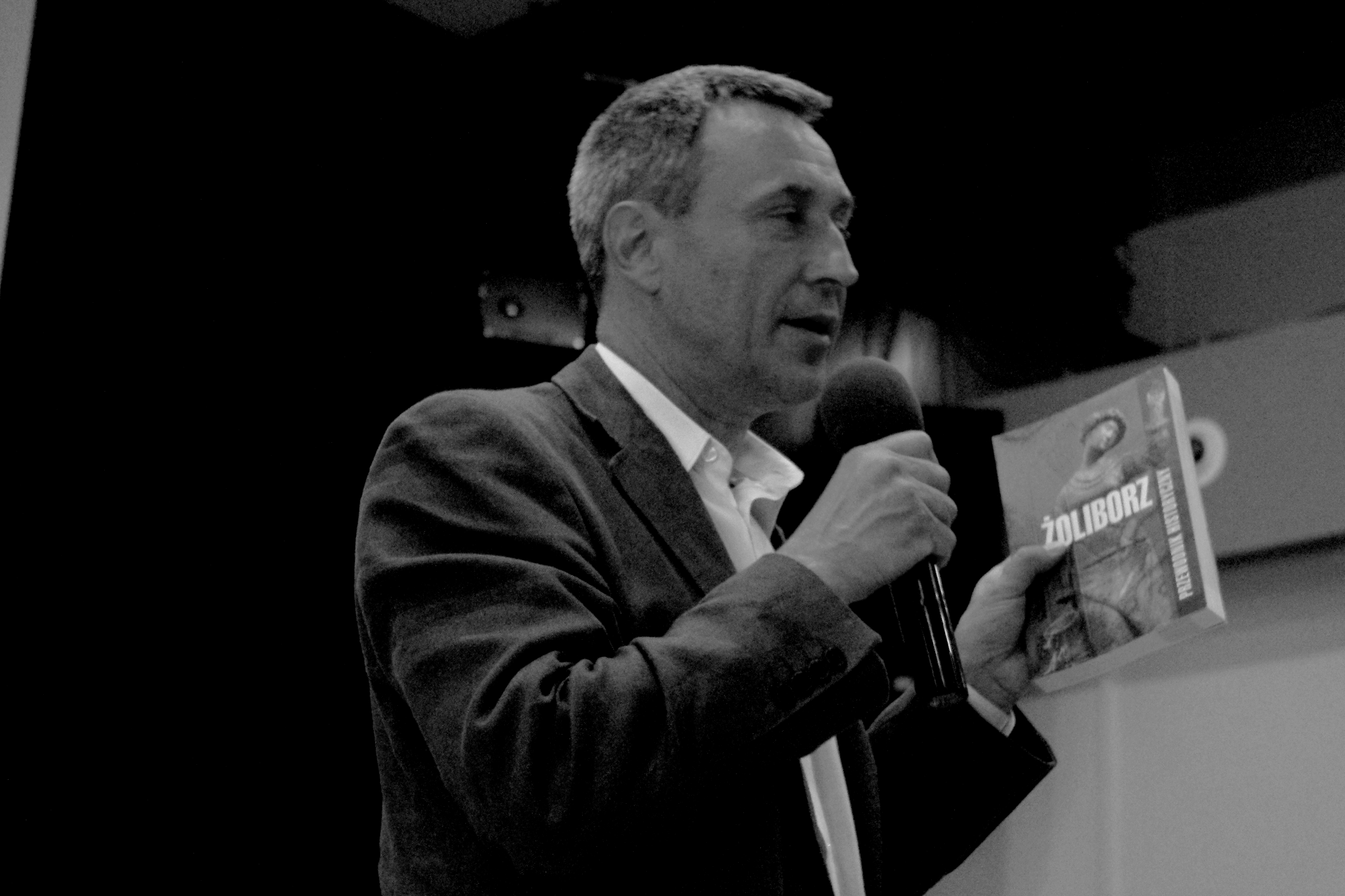 Witold Sielewicz (ur. 1955) - polski samorządowiec regionu warszawskiego, działacz opozycji w latach 70. i 80.